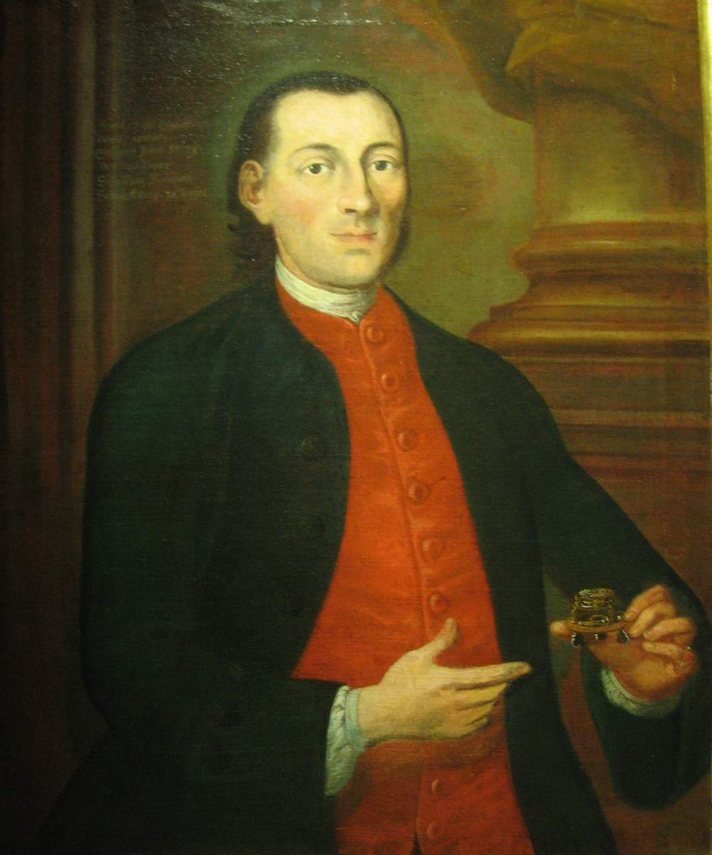 Sebastian Baumann (1729-1805), deutscher Uhrmacher; Portrait von Sigismund Reis (Heimatmuseum Friedberg)